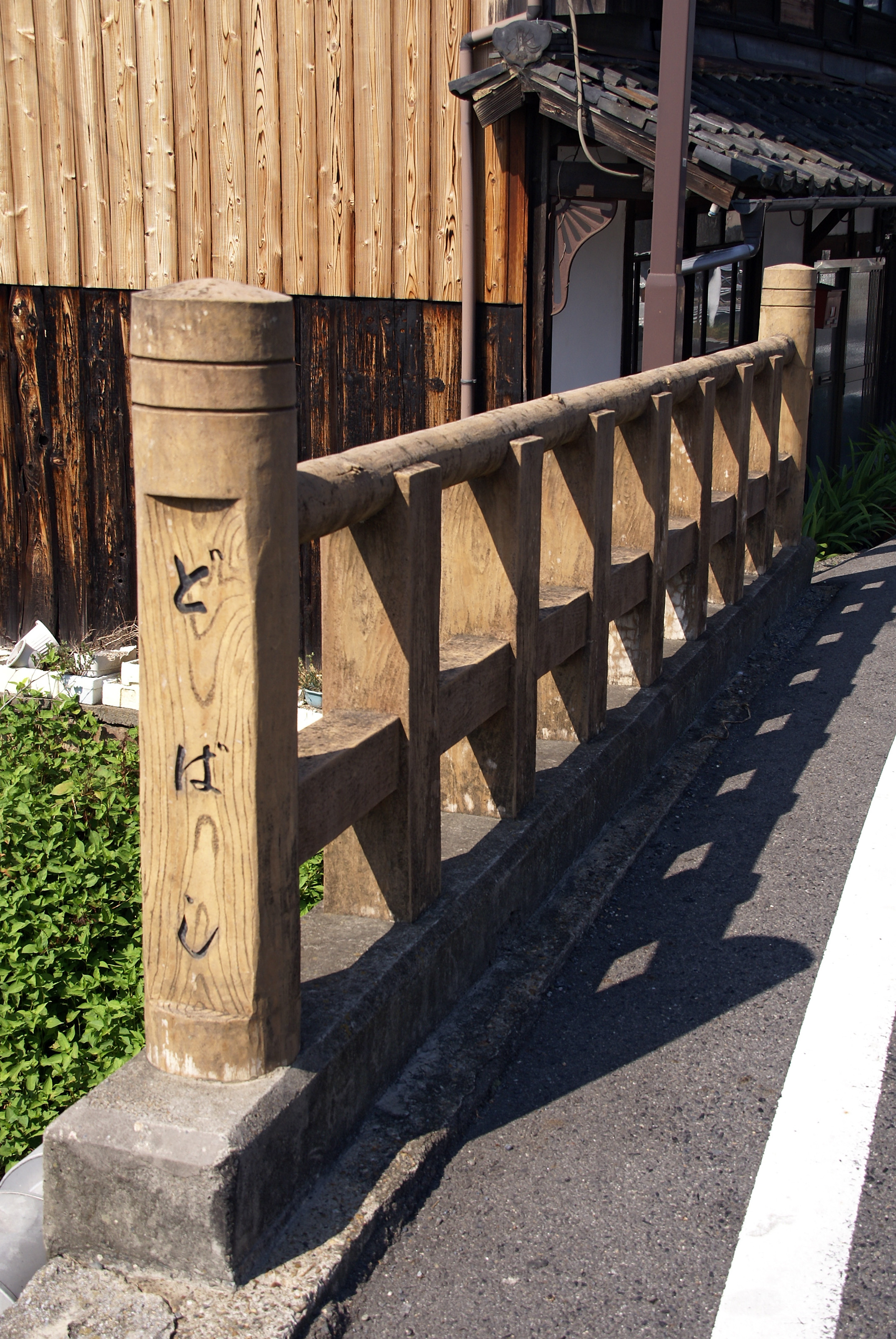 Moriyama-juku in Moriyama, Shiga prefecture, Japan